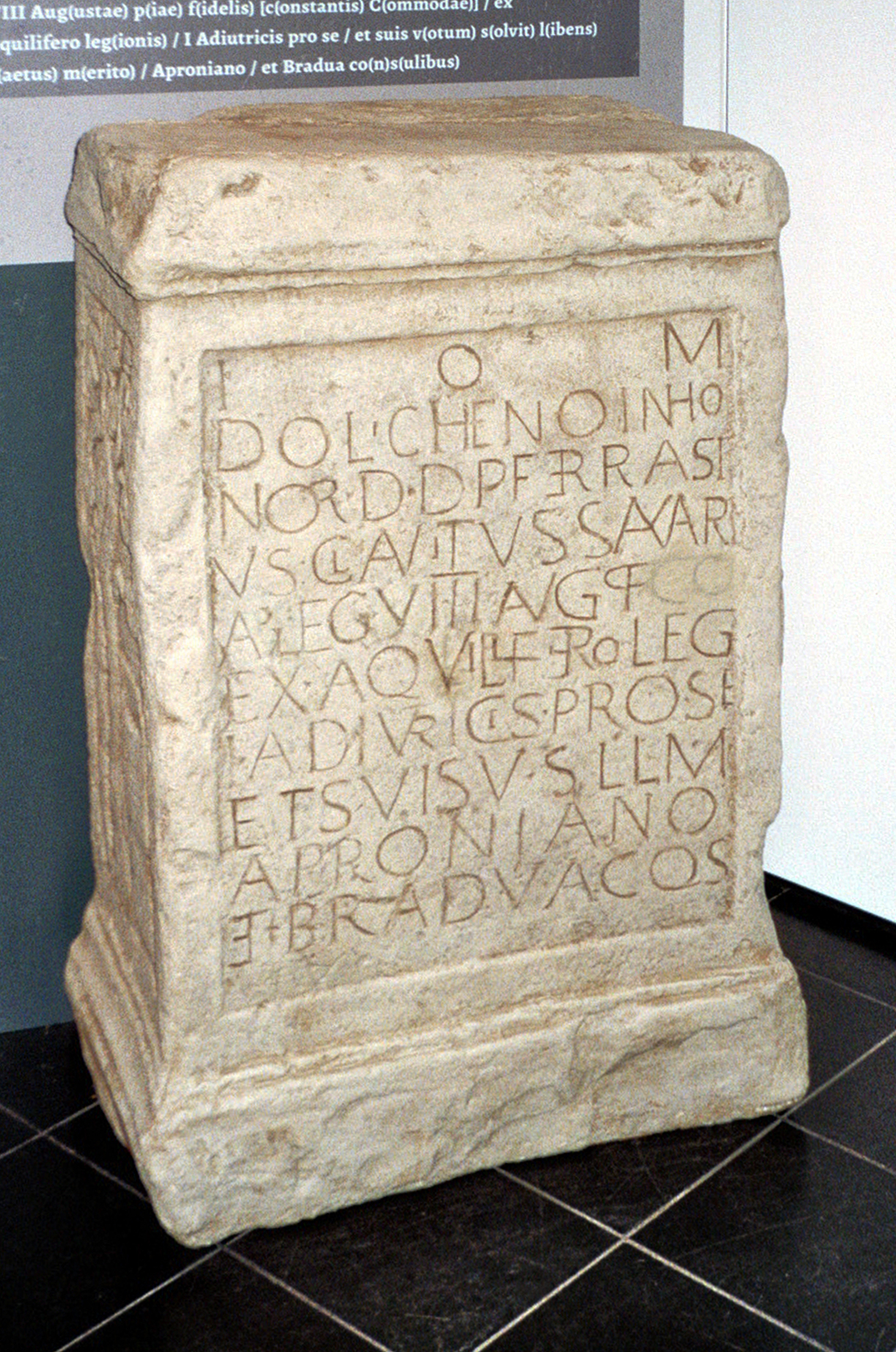 Abguss des Grabsteins CIL XIII 6646 im Römermuseum Osterburken. Text: I(ovi) O(ptimo) M(aximo) / Dolicheno in ho/nor(em) d(omus) d(ivinae) P(ublius) Ferrasi/us Cl(audia) Avitus Savari/a )(centurio) leg(ionis) VIII Aug(ustae) P(iae) F(idelis) C(onstantis) C(ommodianae) / ex aquilifero leg(ionis) / I Adiutricis pro se / et suis v(otum) s(olvit) l(ibens) l(aetus) m(erito) / Aproniano / et Bradua co(n)s(ulibus)